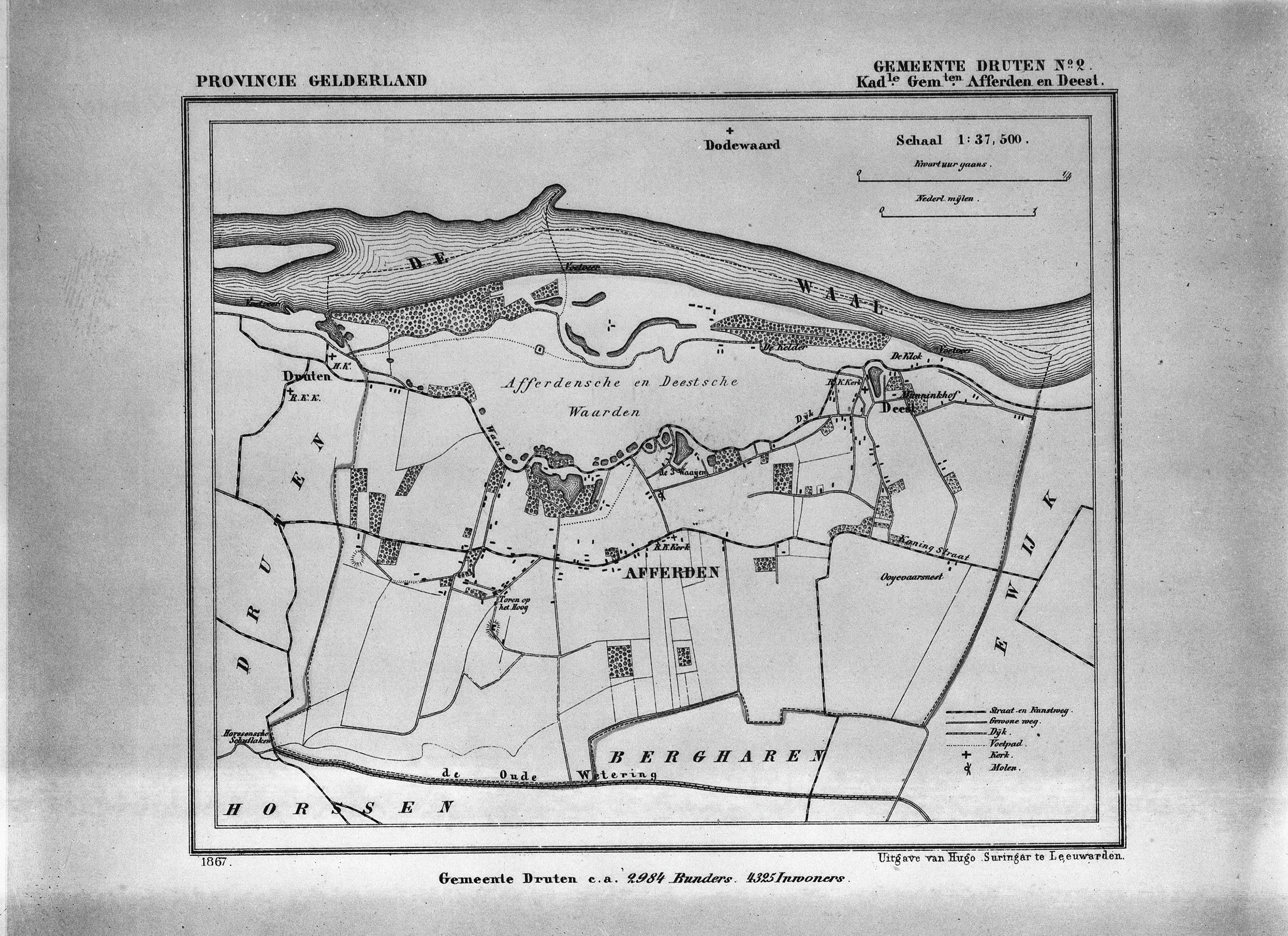 Waal/ Topografische kaart: Topografische kaart, getekend door J.Kuyper 1867 (opmerking: Reproductie)